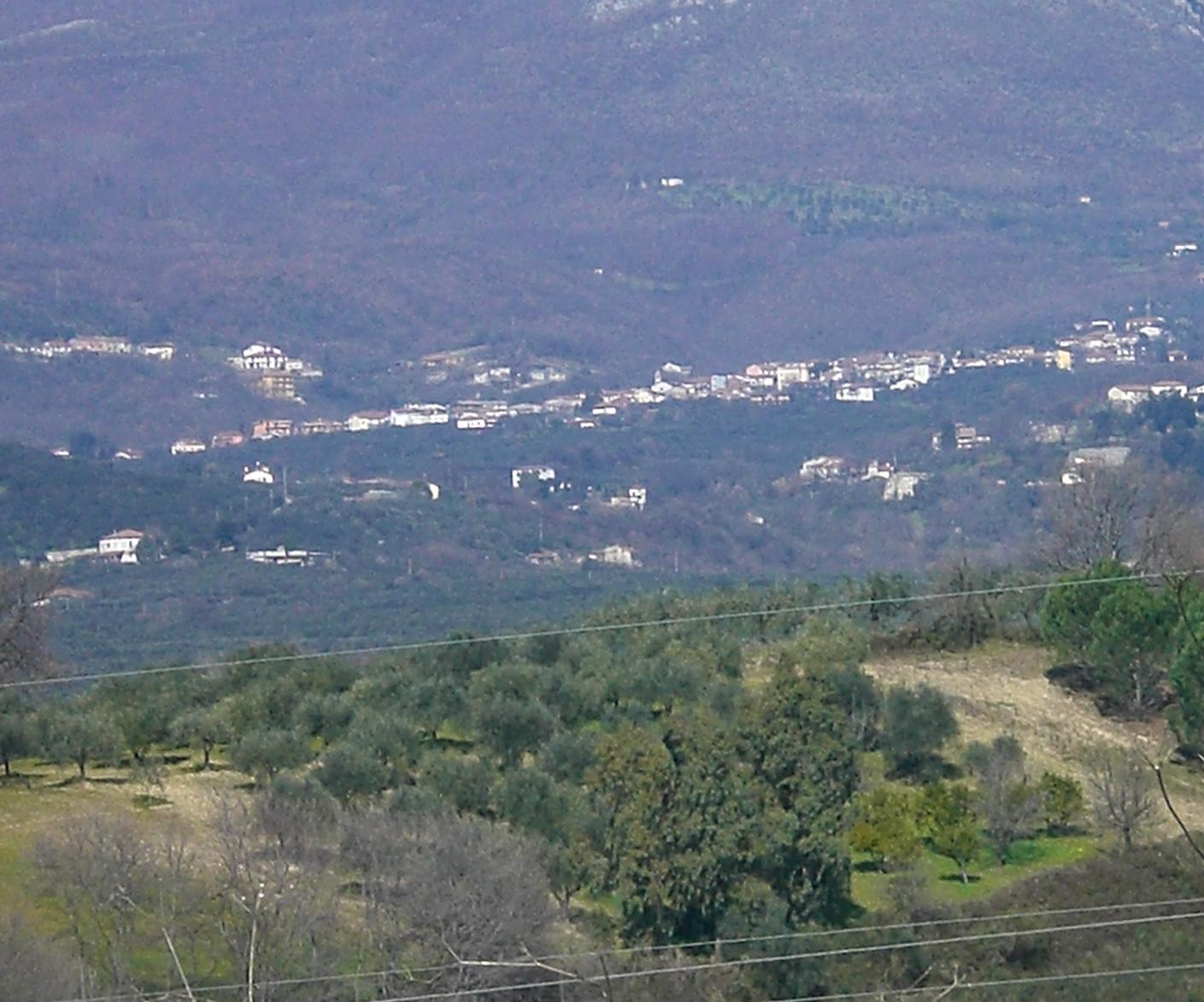 Panorama di Puglietta